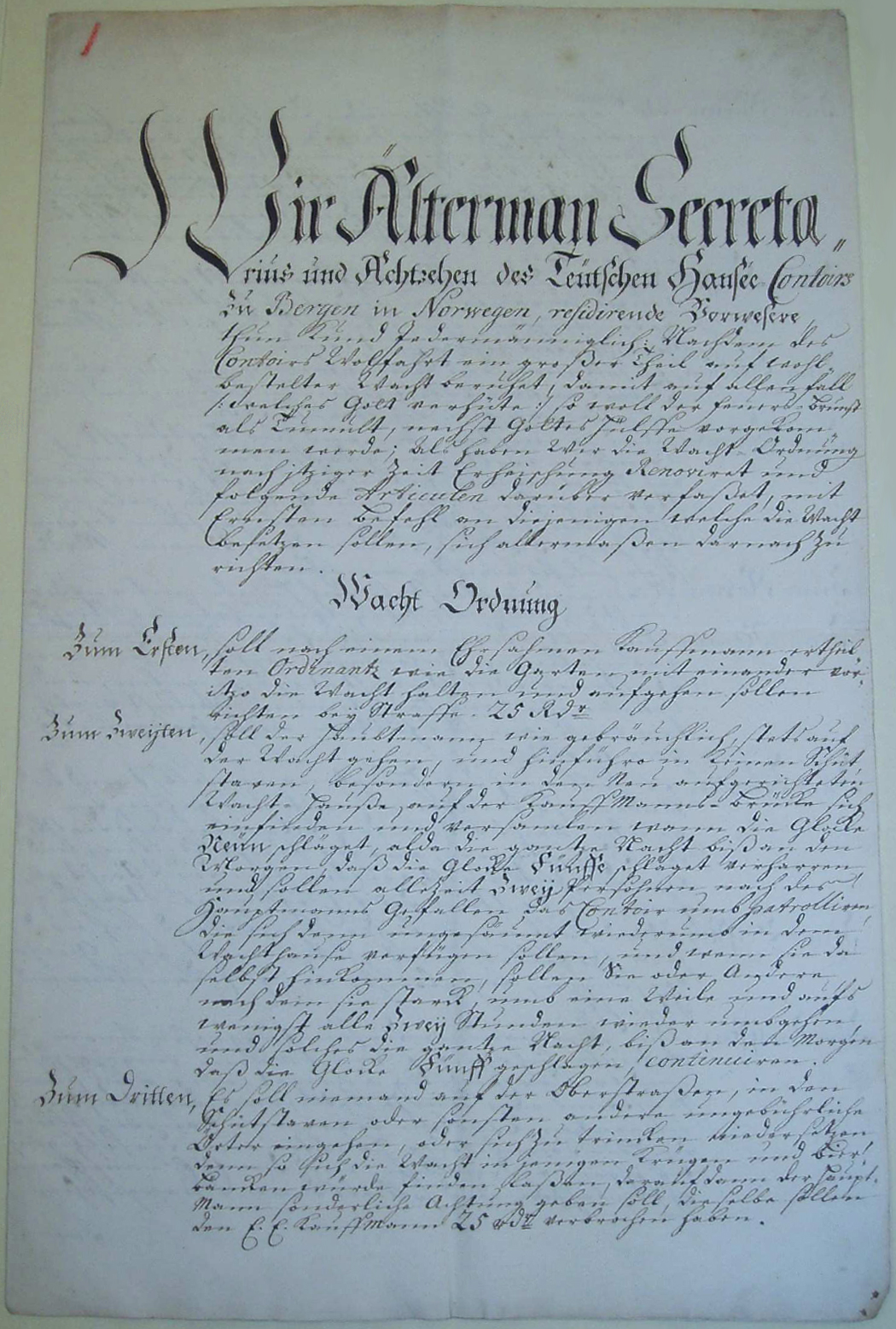 Erste Seite einer dreiseitigen Wachtordnung, die in dreizehn Punkten aufgegliedert ist. Sie beinhaltet Verhaltensregeln zum Brandschutz und andere Verhaltensregeln während der Wache, sowie Strafandrohung bei Nichteinhaltung der Regeln und die Art oder Höhe der jeweiligen Strafe. Verfasst von Christian Wilhelm Höltich am 24. Dezember 1704.